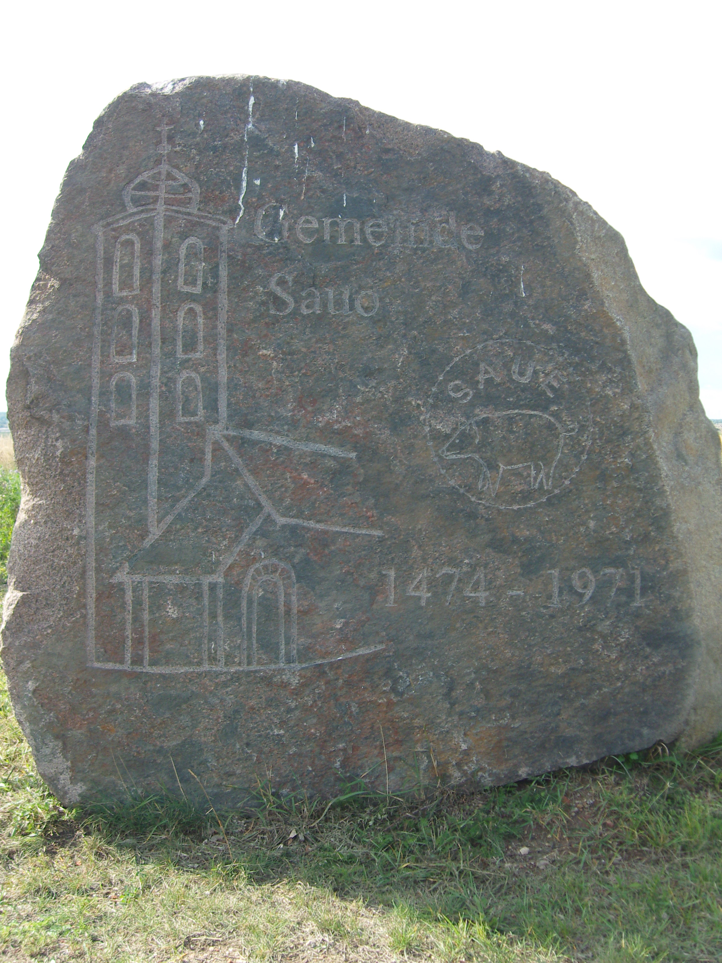 Die ehemalige Dorfkirche von des devastierten Ortes Sauo, dargestellt auf einem Stein am Aussichtspunkt Reppist